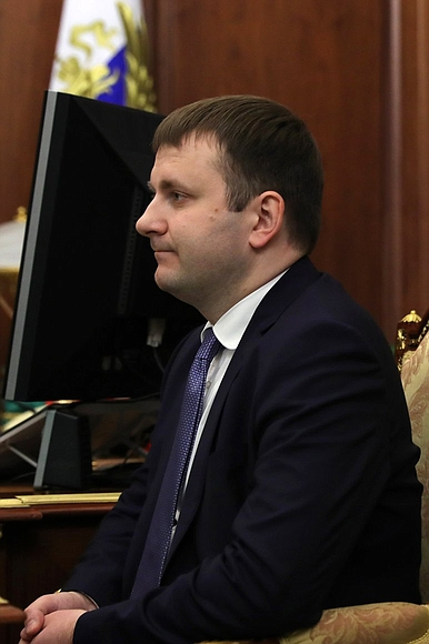 Максим Орешкин на встрече с Владимиром Путиным (2016)